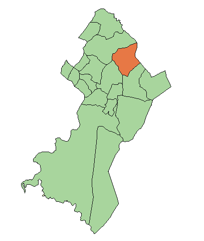 Ubicación de Areguá.